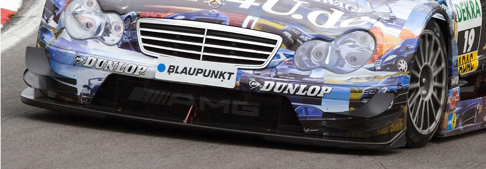 Сплиттер автомобиля ДТМ, Мерседес С-класс, 2005г.